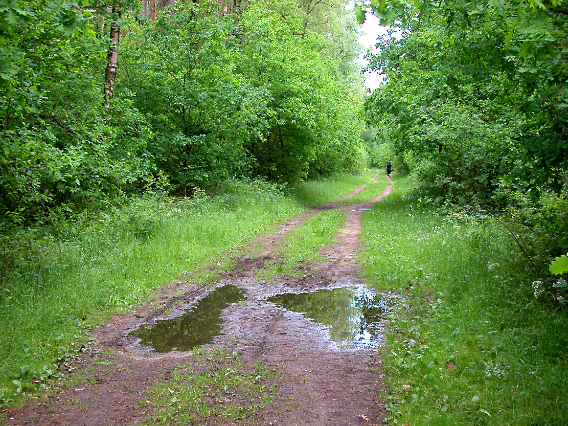 Große Heide. Dorsten-Rhade. Nord.